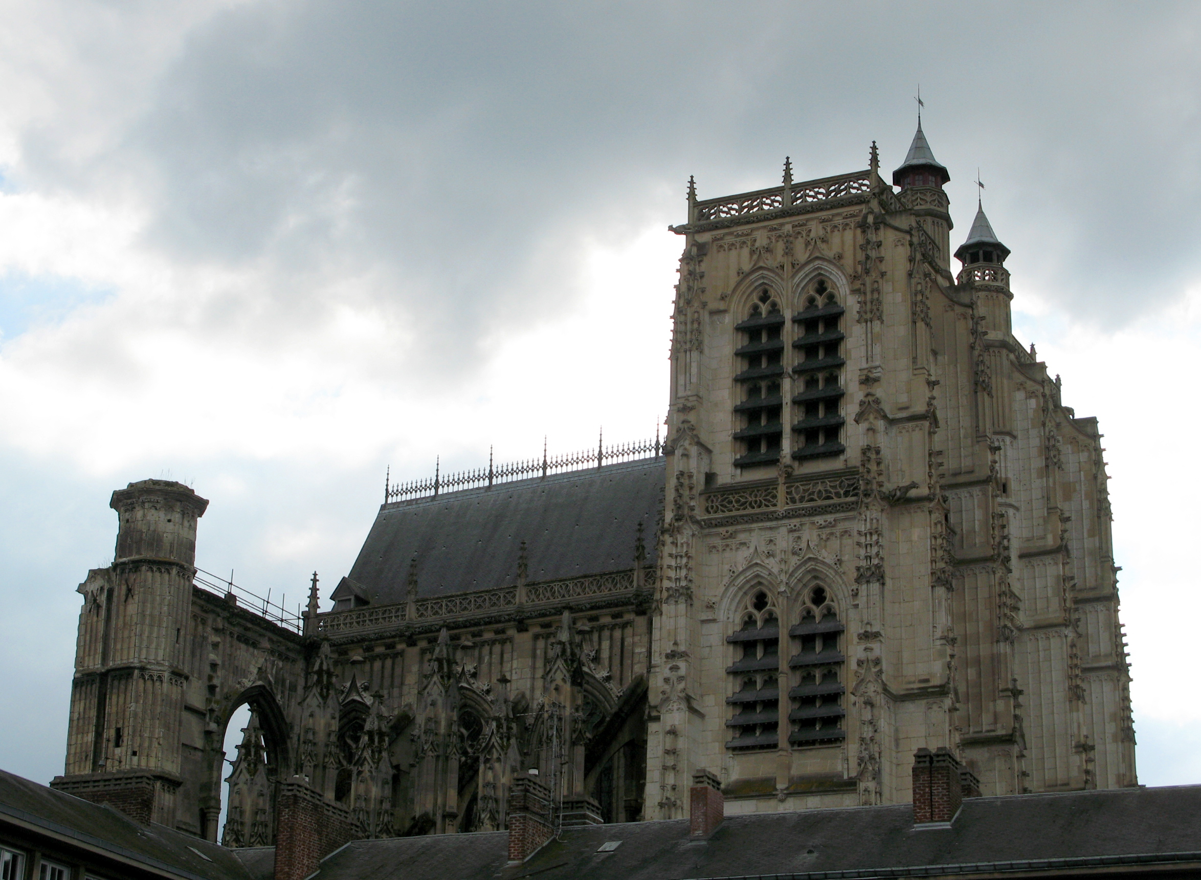 Abbeville (Somme, France) - La collégiale Saint-Wulfran. .